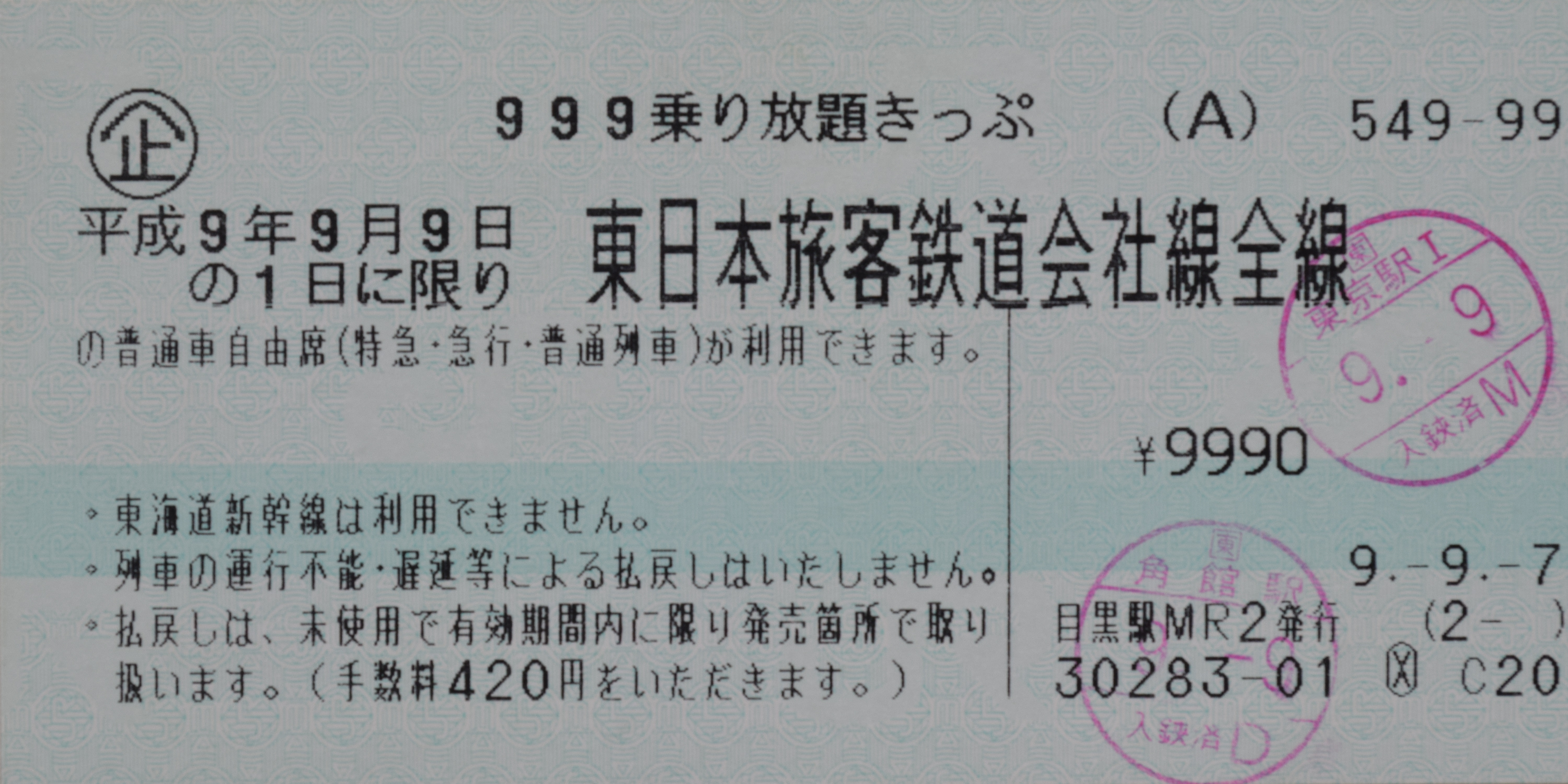 平成9年9月9日にちなみ、JR東日本管内一日限定乗り放題で発売された999乗り放題きっぷ 値段も9990円